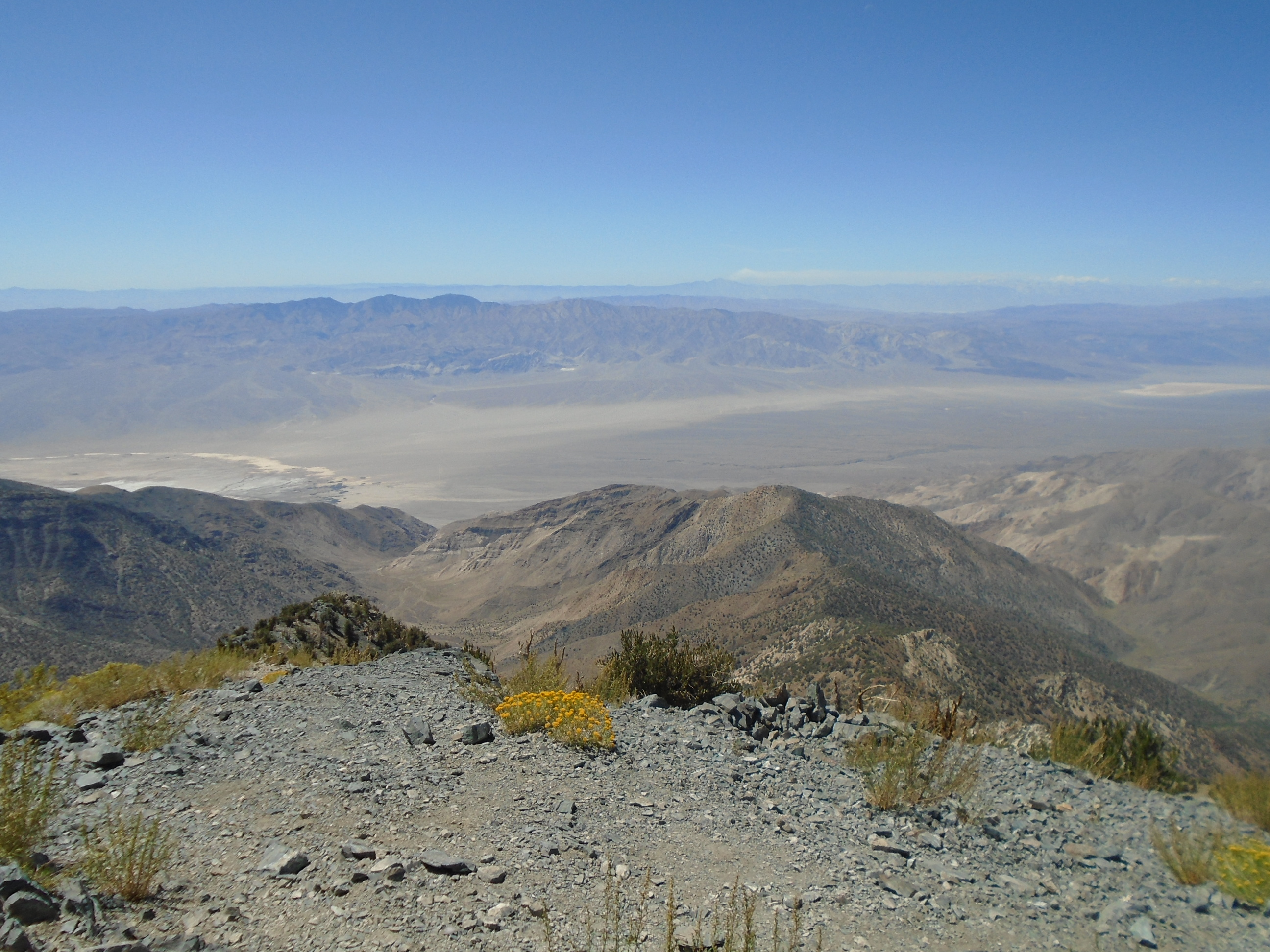 Údolí Panamint Valley, pohoří Argus Range a v pozadí pohoří Sierra Nevada z vrcholu hory Telescope Peak